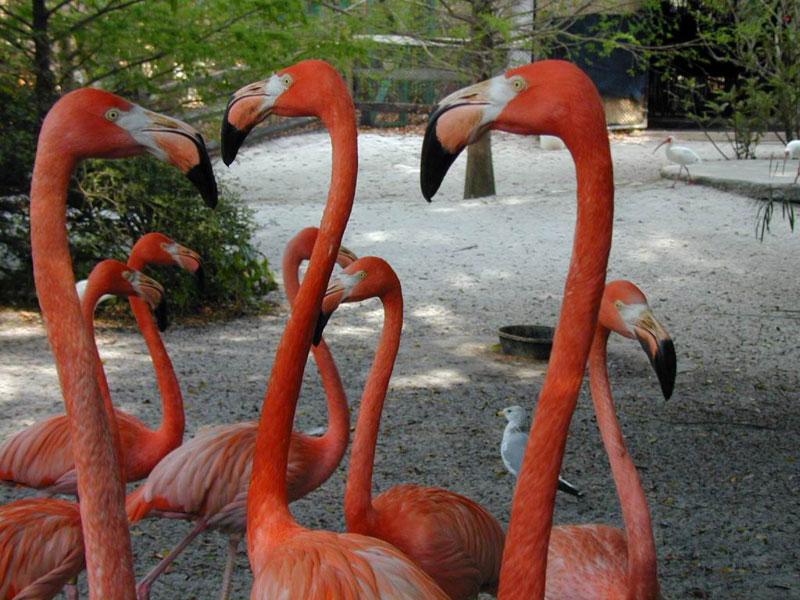 Flamingos in Florida